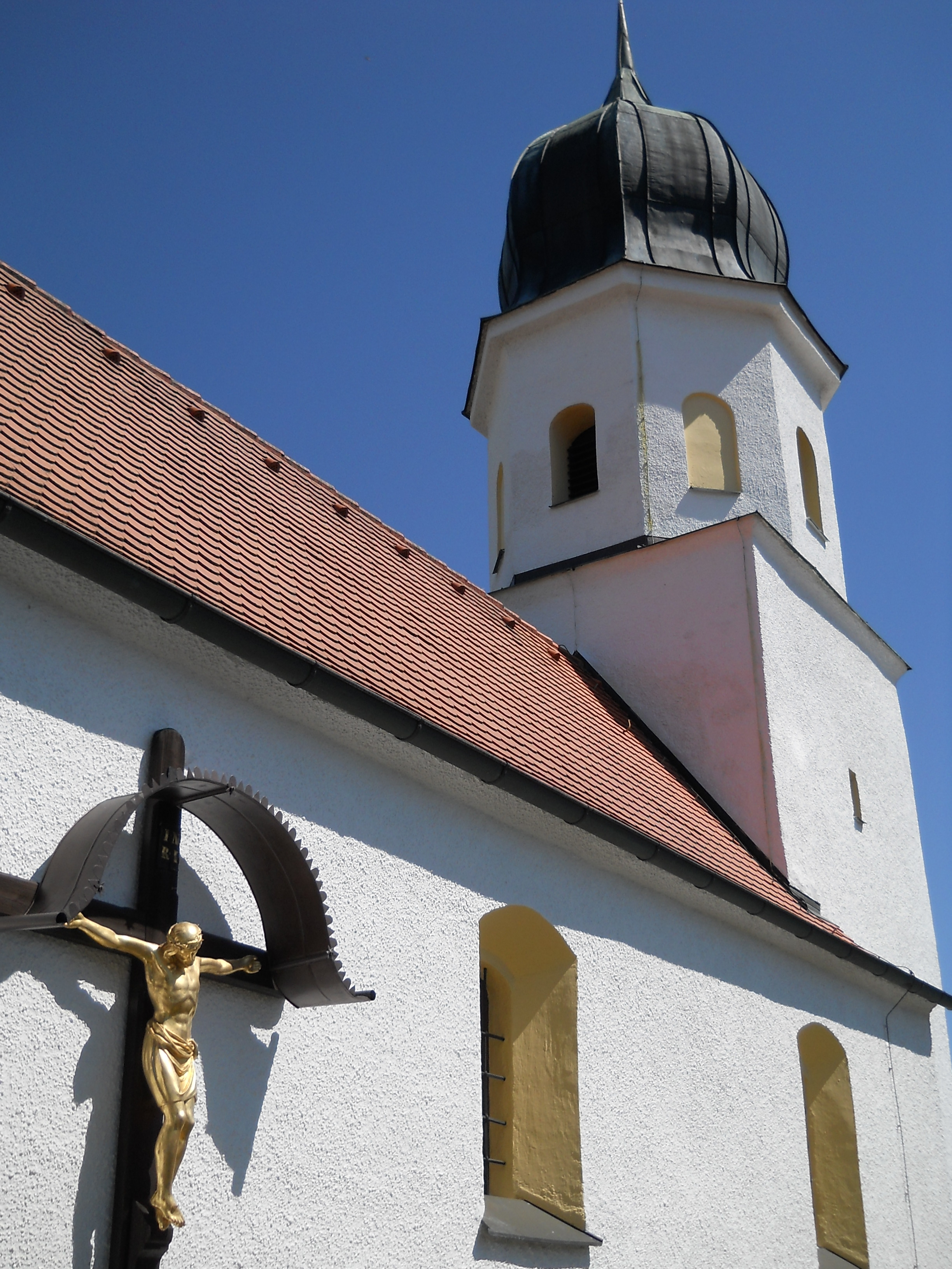 Kath. Filialkirche St. Andreas in Biberg, Ortsteil der Gemeinde Kipfenberg im oberbayerischen Landkreis Eichstätt